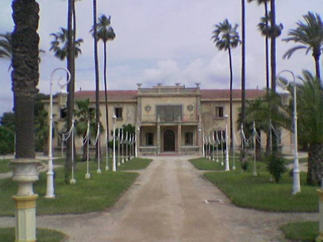 Palau i jardí del Marqués de Fontalba (Xacarella, el Baix Segura, País Valencià).